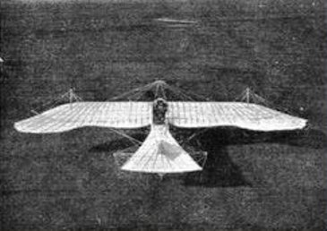 Az Igo Etrich tervezte Taube (Galamb) gép